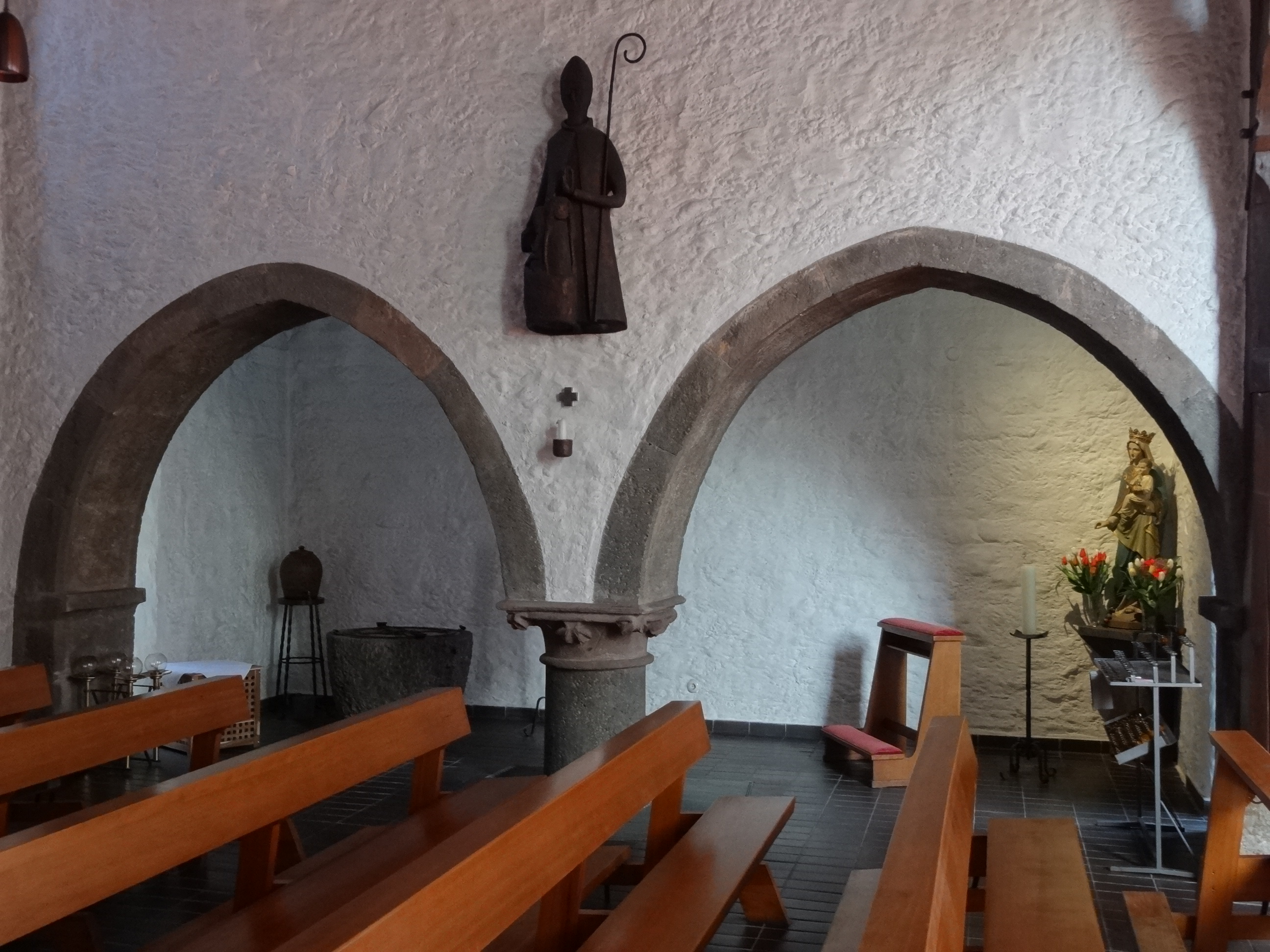 St. Nikolaus (Münzenberg)